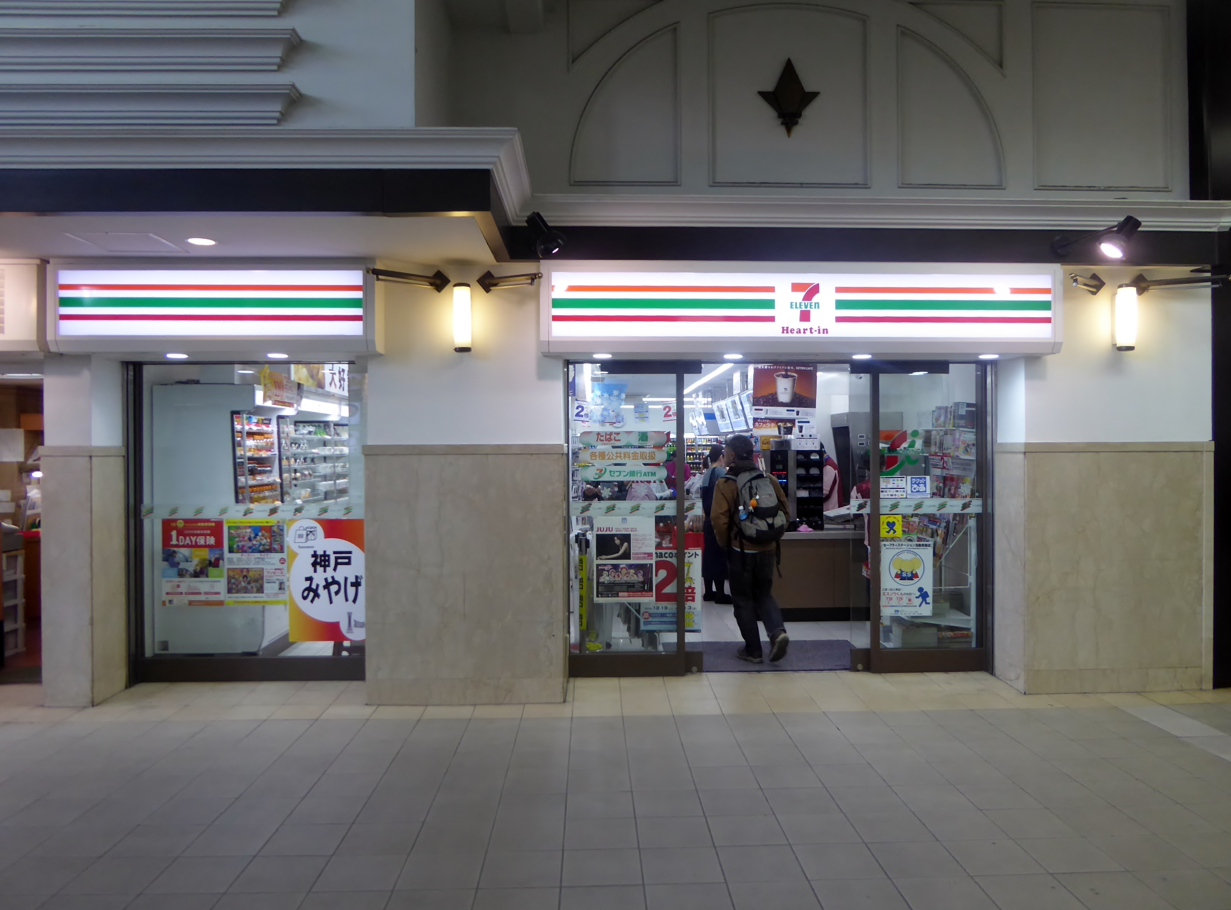 セブン-イレブンハートインJR神戸駅中央口店を撮影。